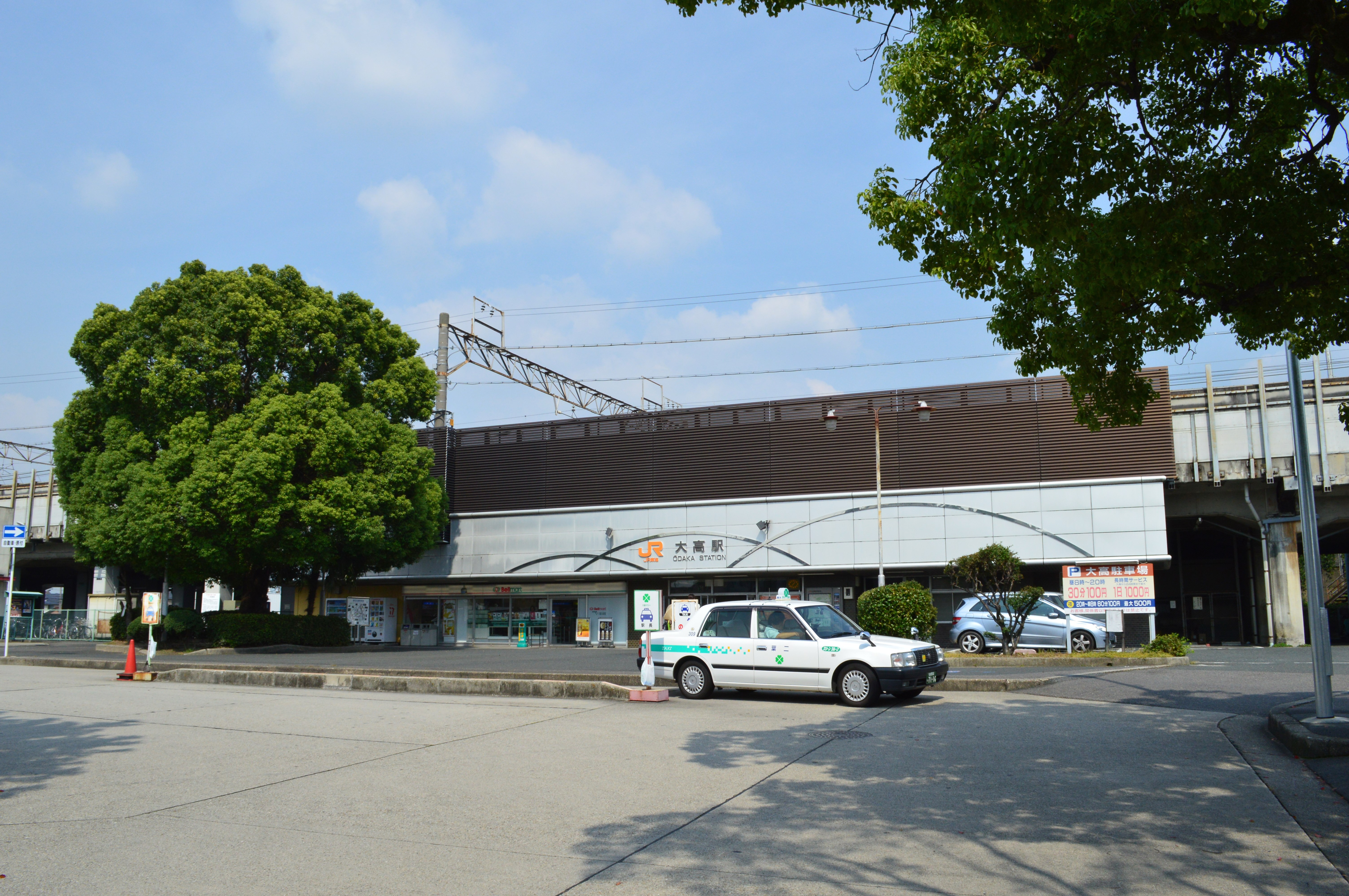 大高駅 駅舎